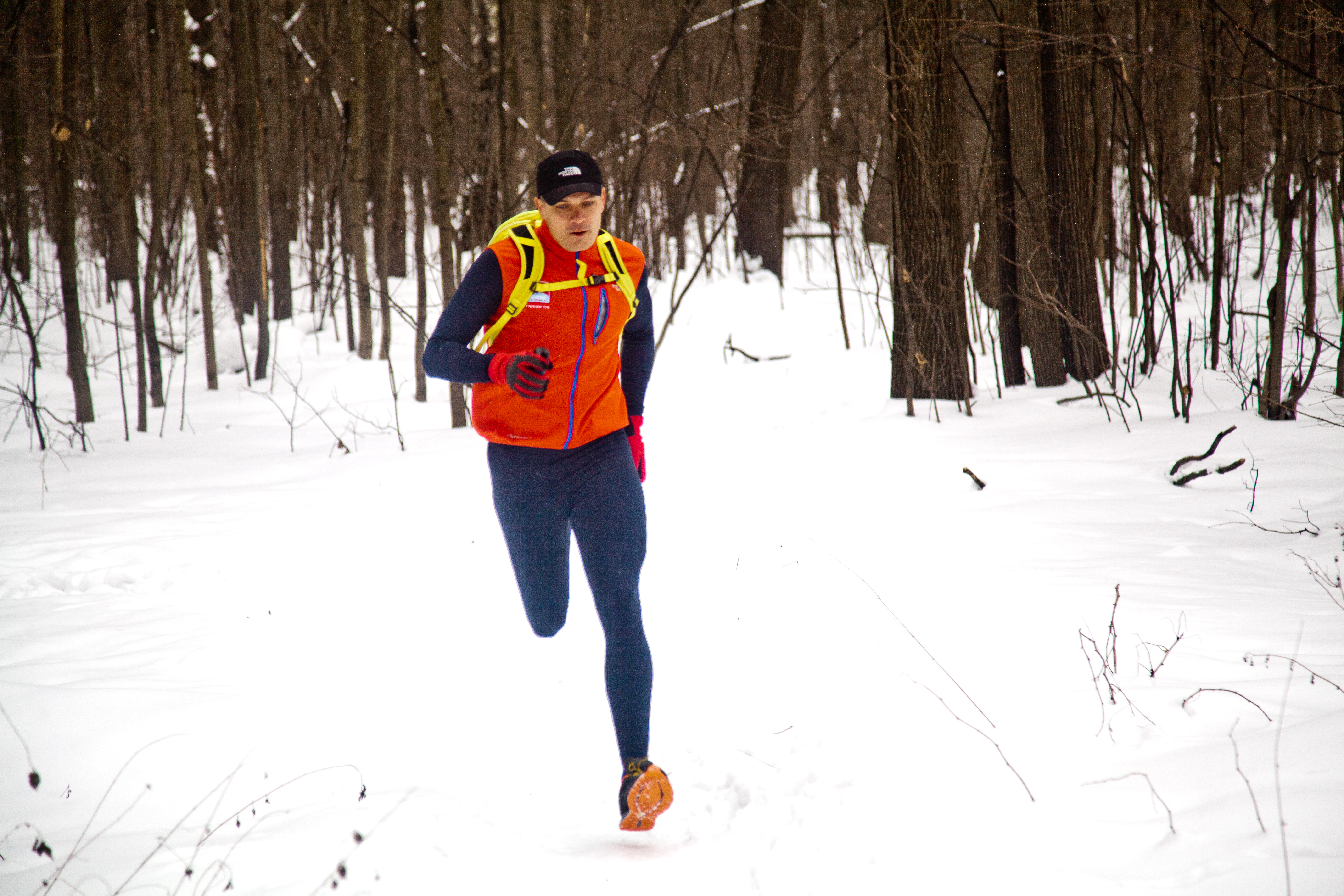 Супермарафонец Дмитрий Ерохин - тренировка в Лосином острове